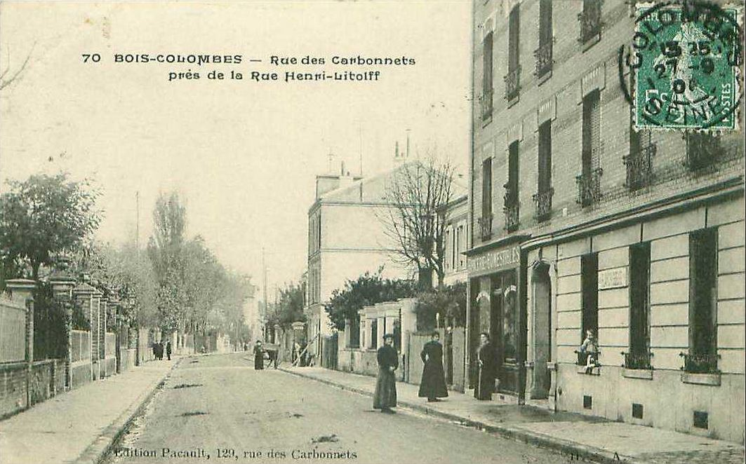 Bois-Colombes.Rue des Carbonnets.Rue Henri-Litolff